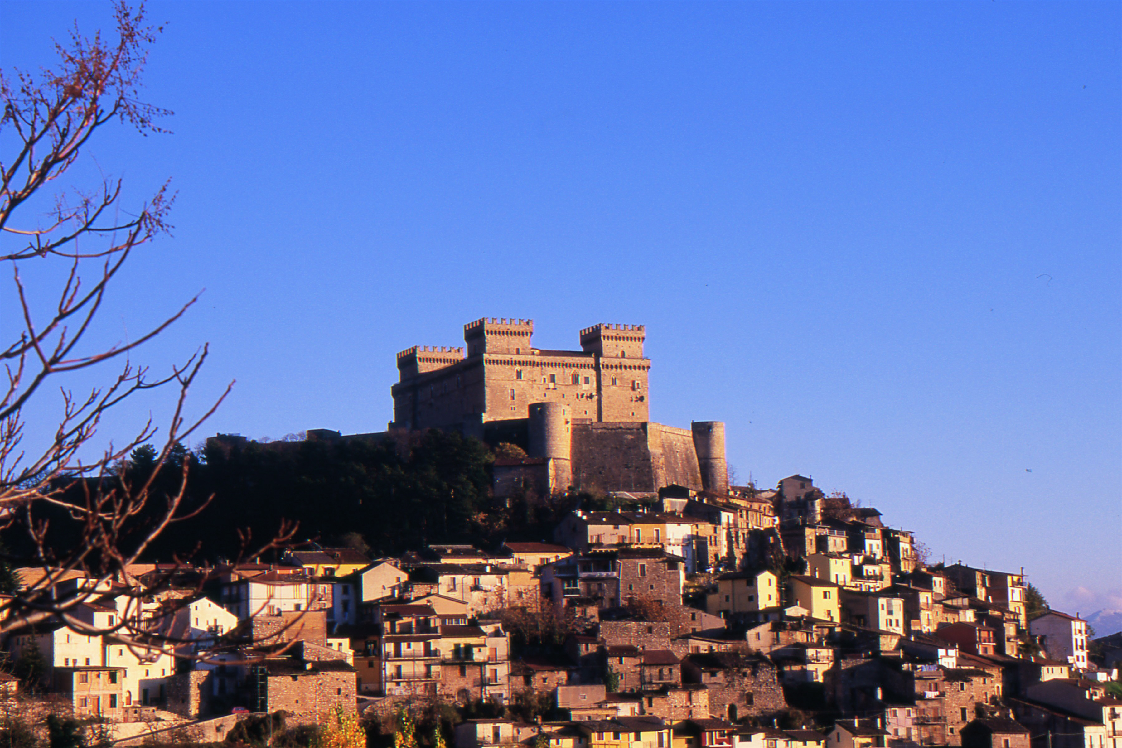 Vista del Castello Piccolomini di Celano con il borgo sottostante